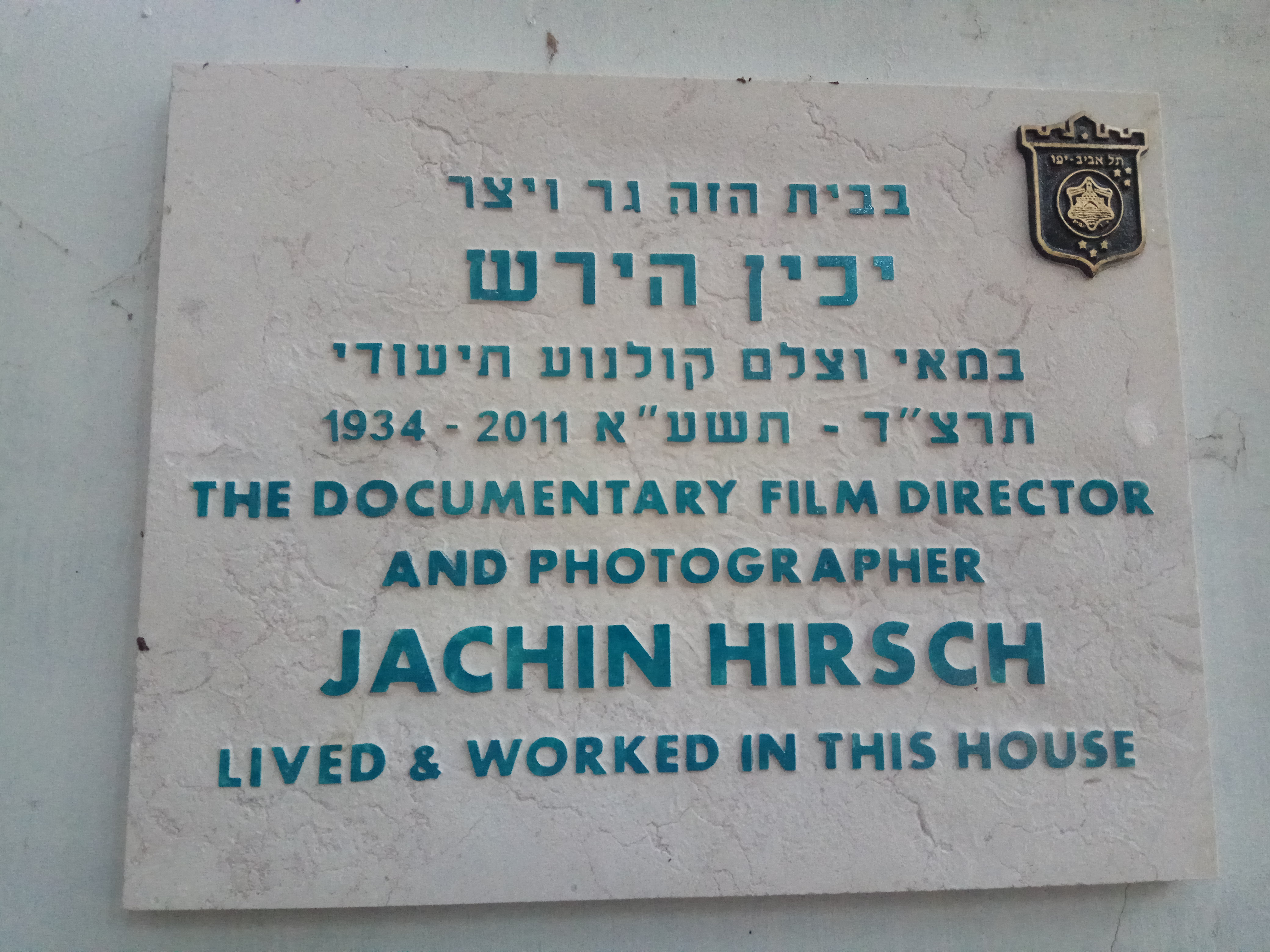 לוחית זיכרון ליכין הירש ברח' נחמני 57 בתל אביב